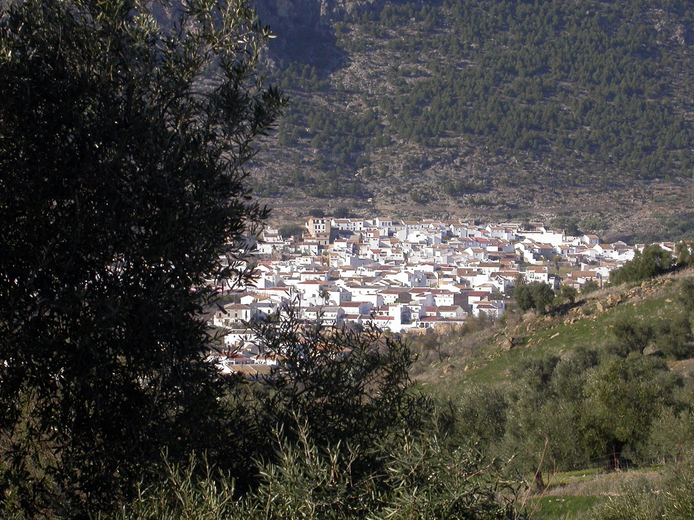 Algodonales (Cádiz, Andalucía, España)